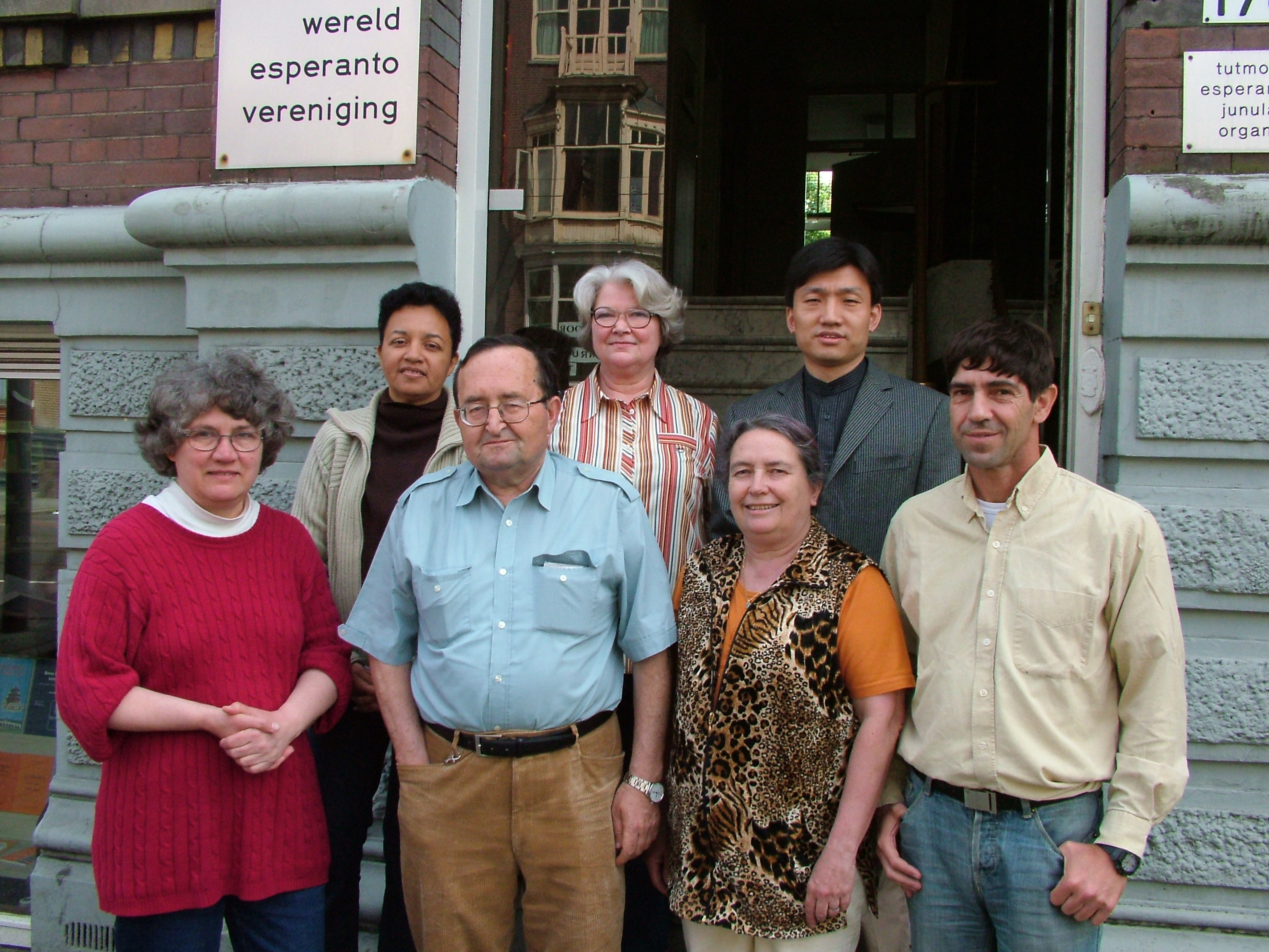 Estraro de Universala Esperanto-Asocio en aprilo 2005. De maldekstre: Ulla Luin, Maritza Gutiérrez González, Renato Corsetti, Ans Bakker-ten Hagen, Claude Nourmont, Yu Tao, Amri Wandel